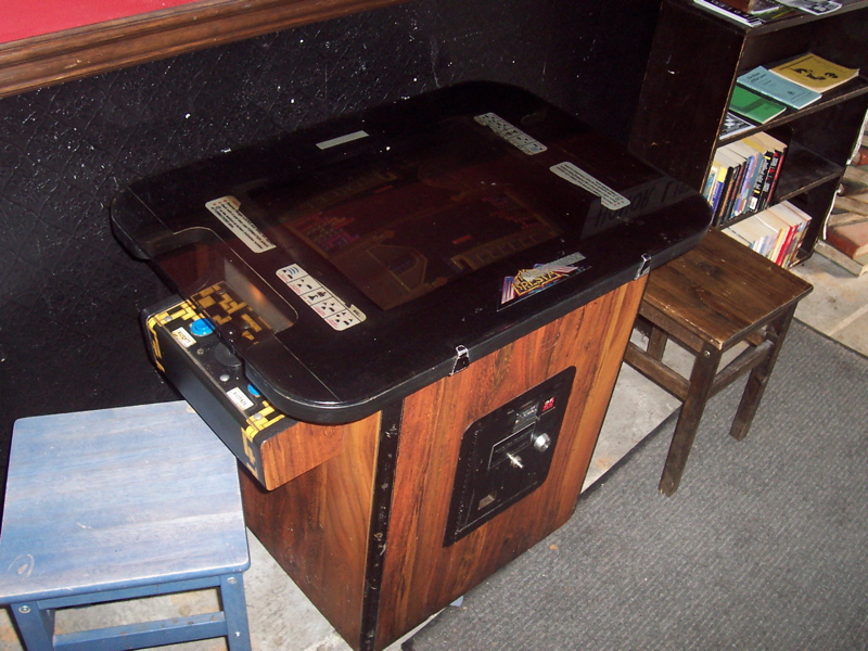 arcade cabinet cocktail tableOne day I want a table arcade game